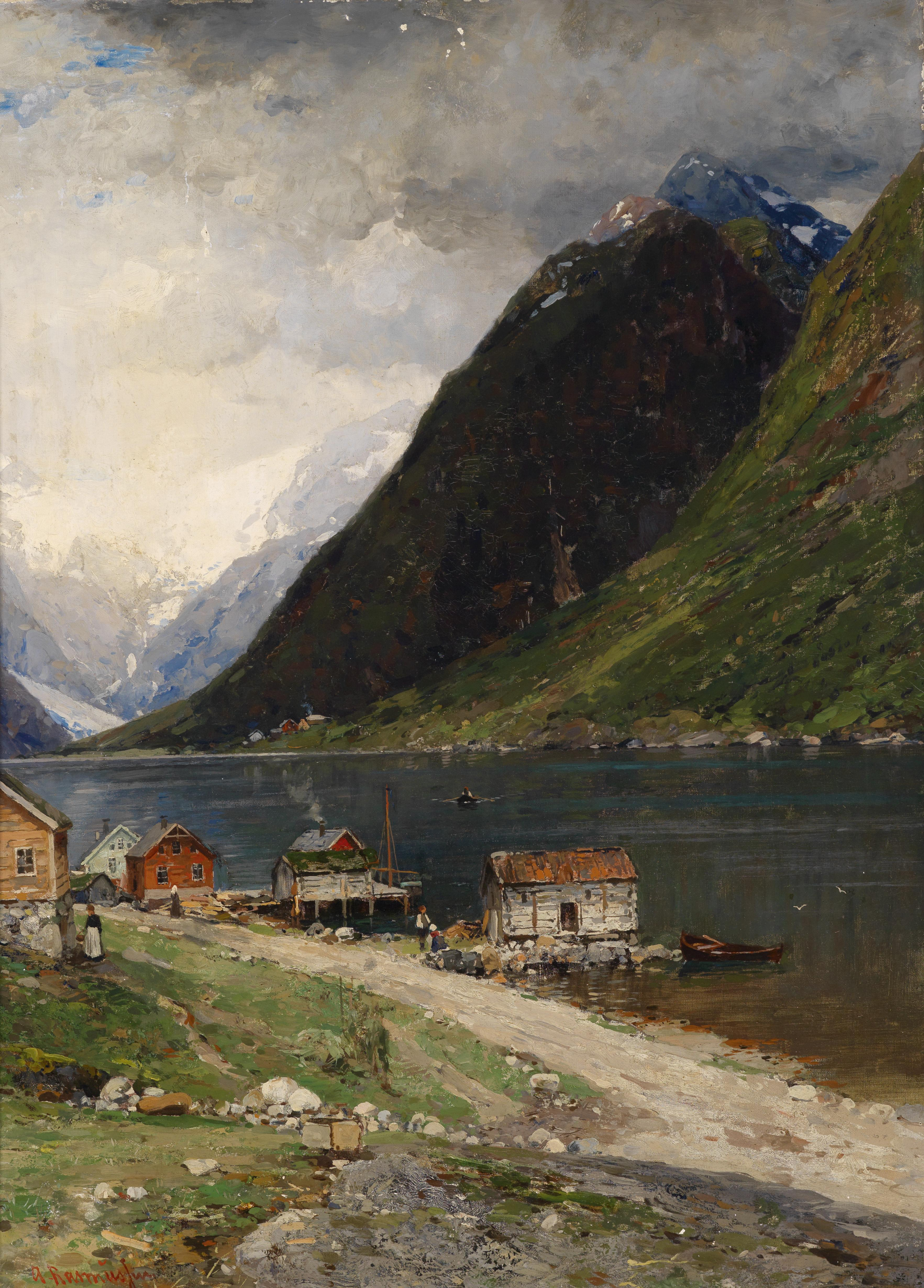 Fjærlandsfjord